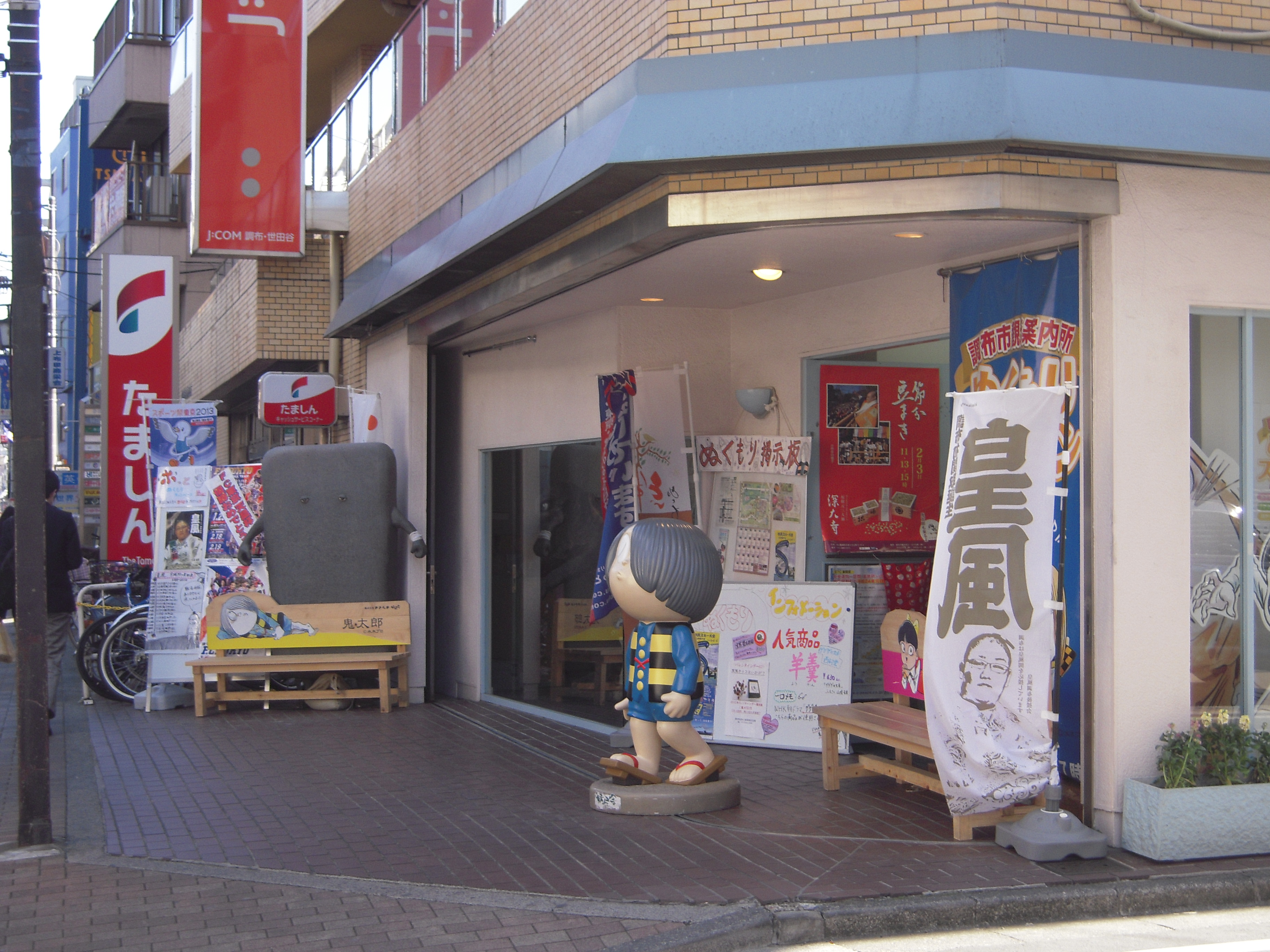 ぬくもりステーション